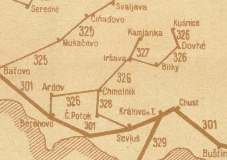 Схема Боржавської вузькоколійки 1938 року